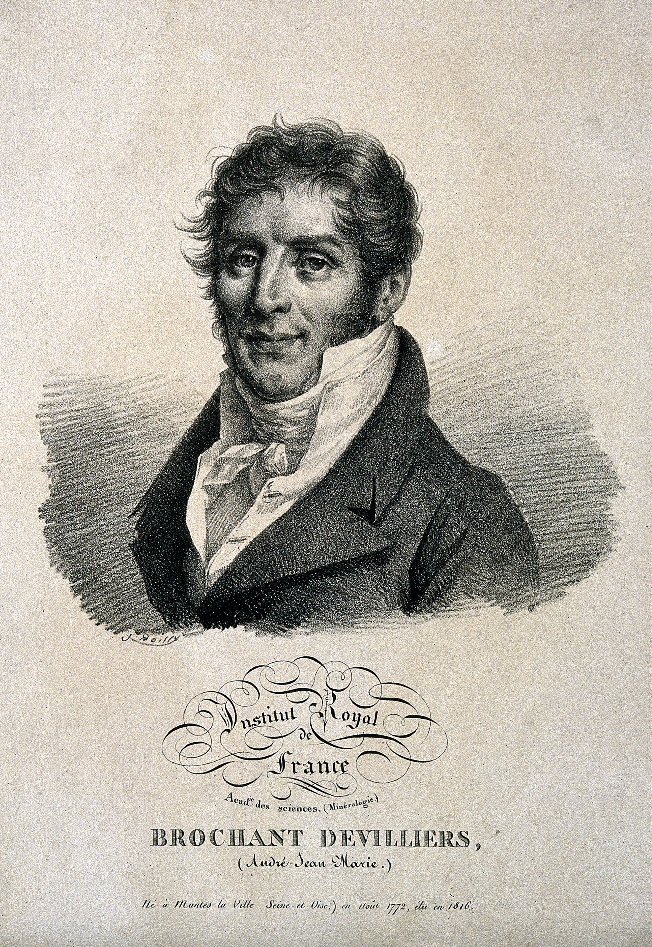 Genre/Technique: Portrait prints. Lithographs. Suject name: Brochant de Villiers, A. J. M. (André Jean Marie), 1772-1840.